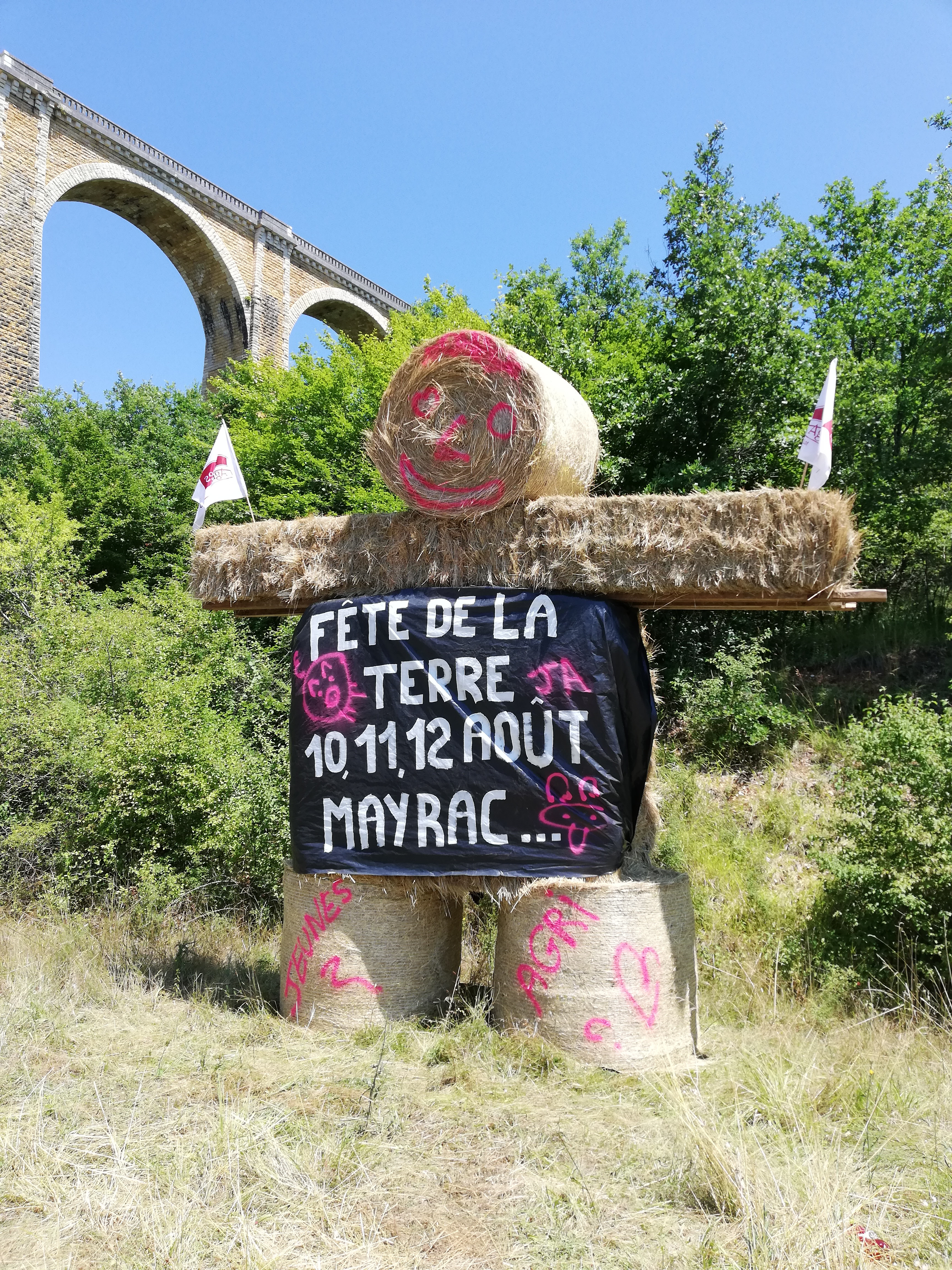 Bonhomme grotesque fait de bottes et balles rondes de paille, annonçant la Fête de la terre organisée par la chambre des Jeunes agriculteurs du Lot à Mayrac en août 2018.